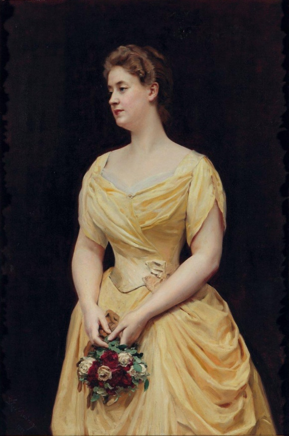 Ellen Ridgway (née Munroe)